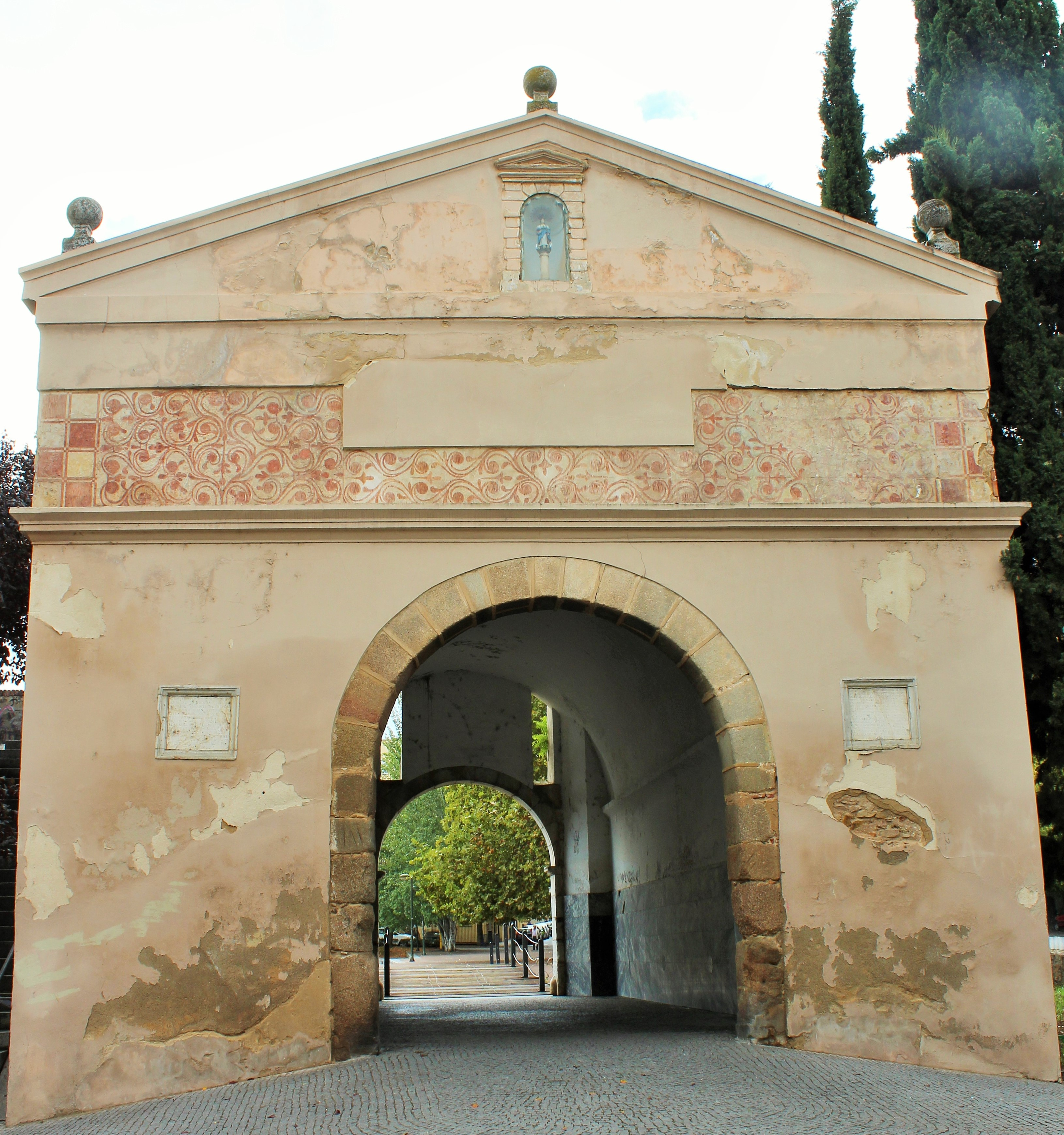 Fachada exterior